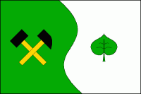 Vejvanov, vlajka. List tvoří dva svislé pruhy, zvlněný zelený s jedním vrcholem a jednou prohlubní a bílý. V zeleném pruhu kosmý mlátek, šikmo přeložený želízkem, oboje černé se žlutými násadami. V bílém pruhu vztyčený zelený lipový list. Poměr šířky k délce listu je 2:3.